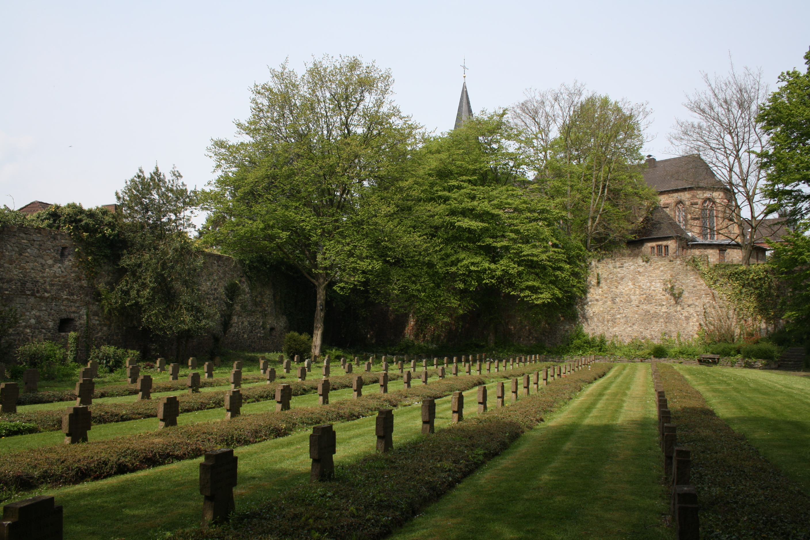 Soldatenfriedhof im Bereich der Burg